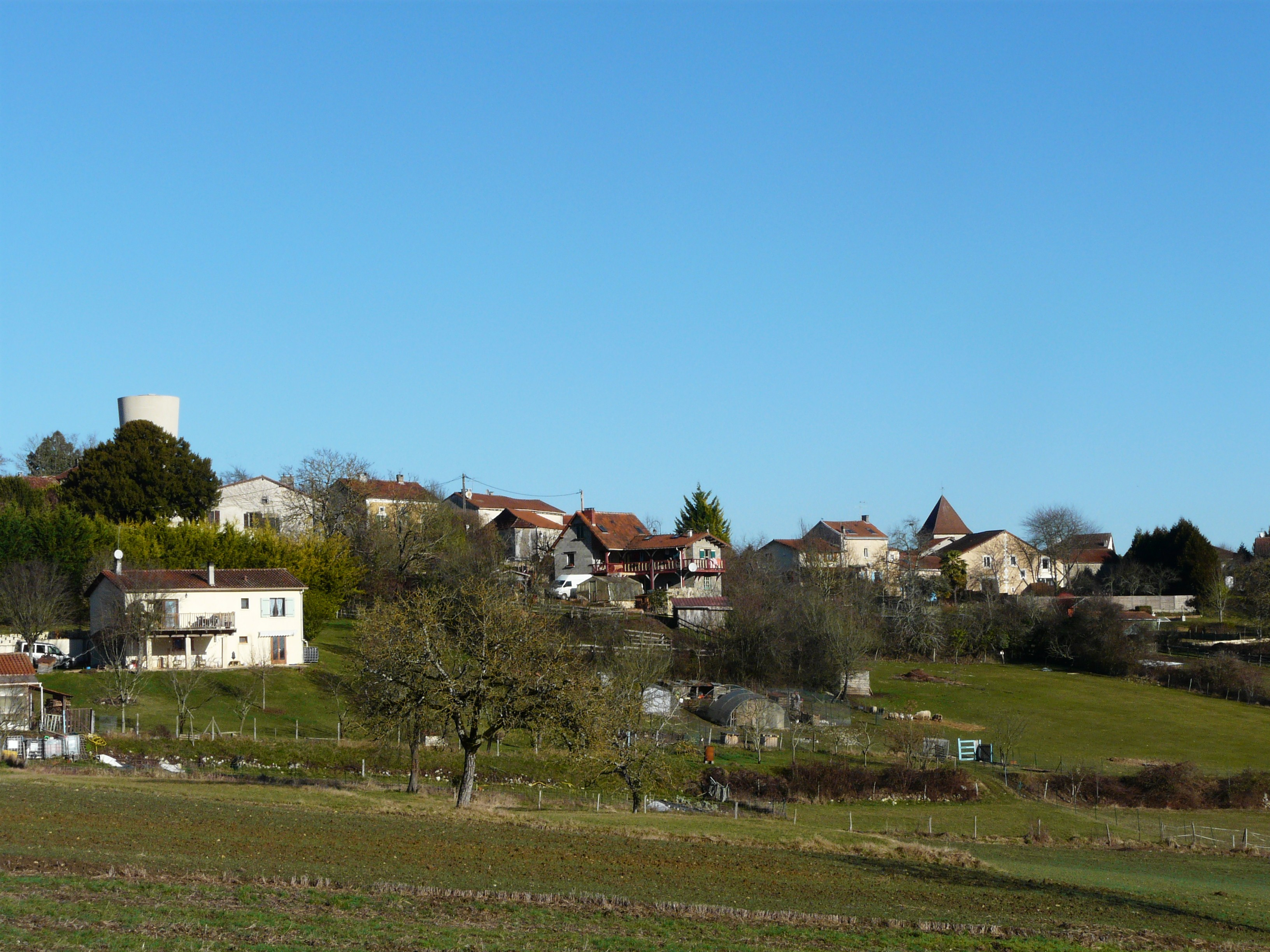 Le village de la Gonterie vu du sud-ouest, La Gonterie-Boulouneix, Dordogne, France.